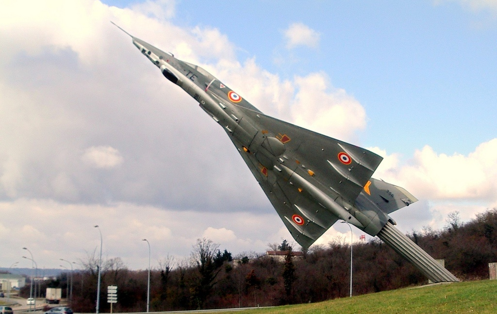 Dassault Mirage III RD in Ambérieu-en-Bugey, die 1993 von der Base aérienne 278 an die Stadt Ambérieu-en-Bugey übergeben wurde.